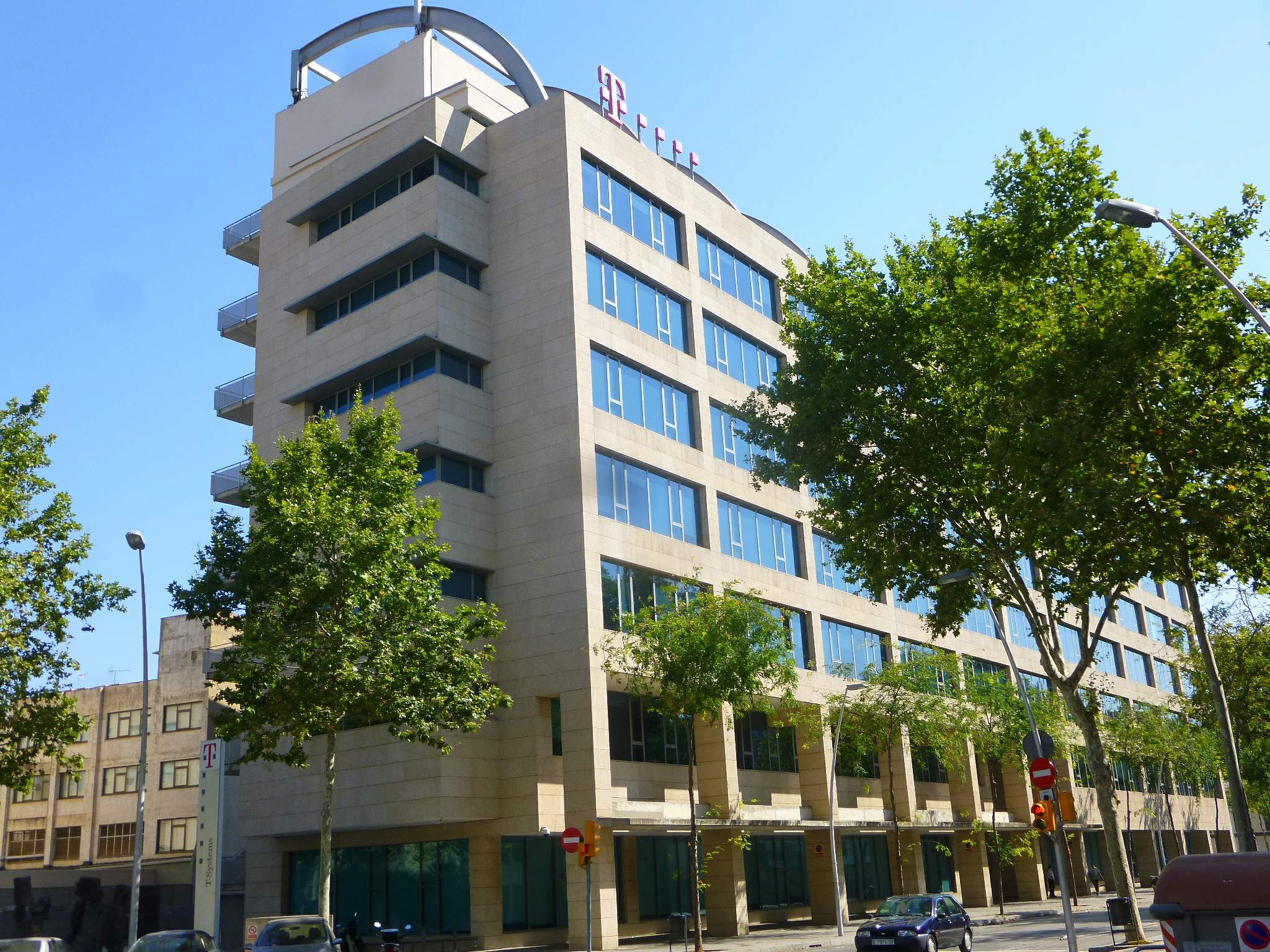 Barcelona - T Systems